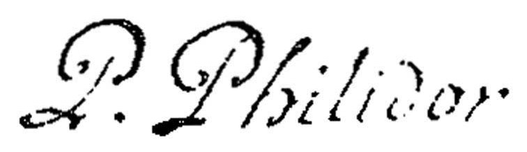 signature de P. D. hilidor